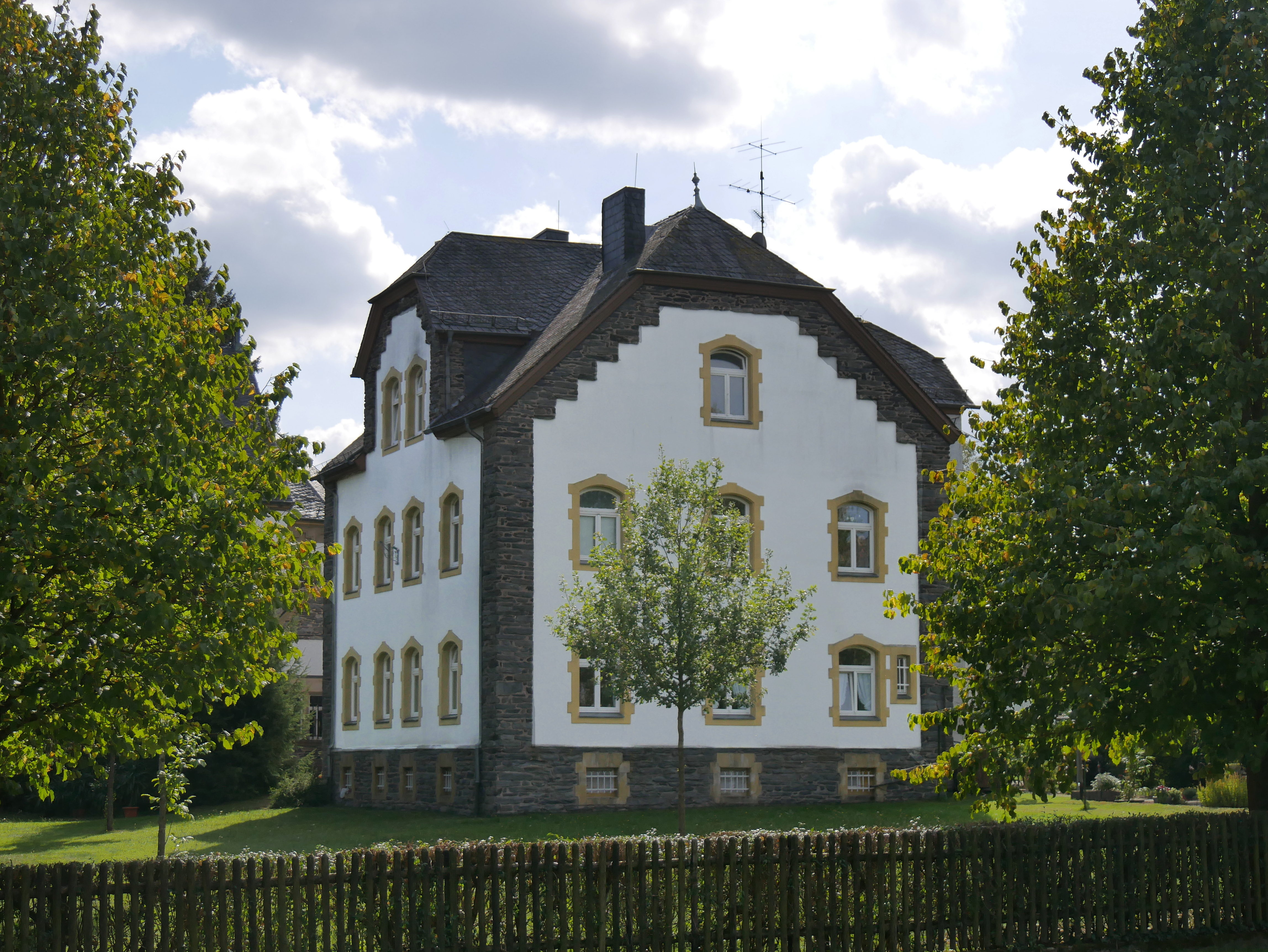 Reinsfeld - Kreis Trier-Saarburg, Katholisches Pfarrhaus